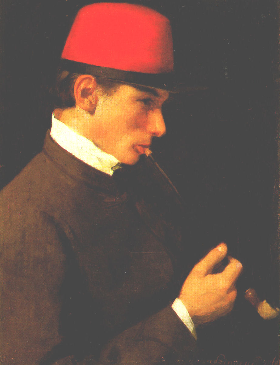 Zsigmond Szinyei Merse (1847–1885): brother of Pál Színyei Merse